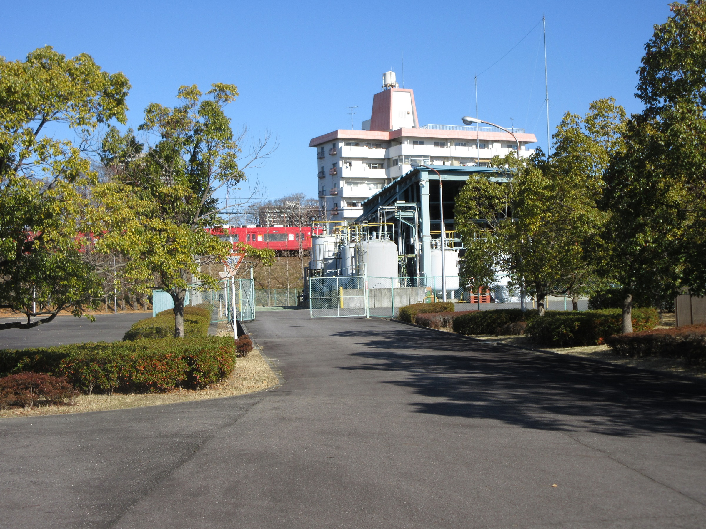 岡崎市久後崎町の旧萬有製薬岡崎工場跡地。 現在はMSD株式会社が管理。